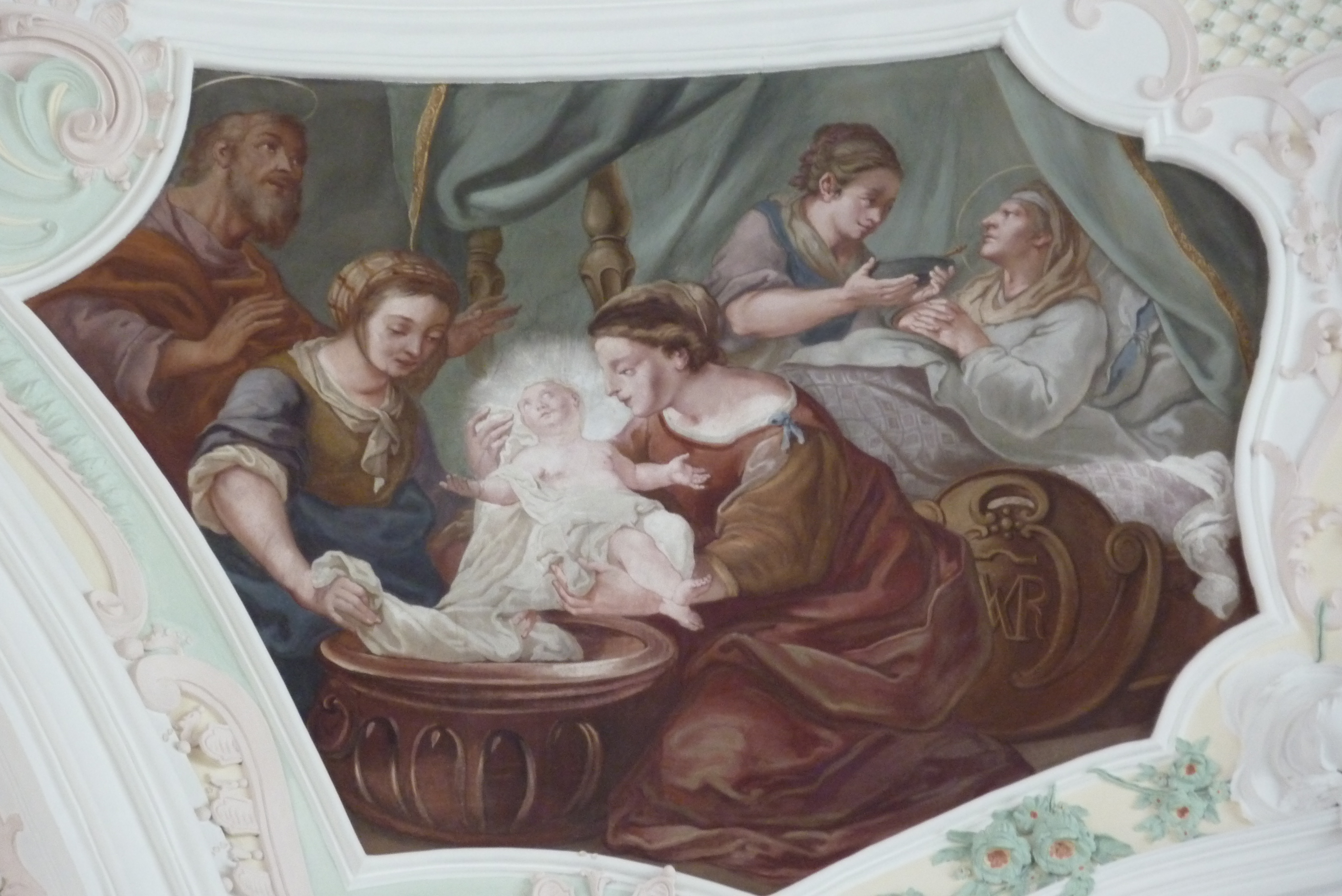 Klosterkirche Mariä Himmelfahrt der Dillinger Franziskanerinnen in Dillingen an der Donau, Fresko mit der Darstellung der Geburt Mariens